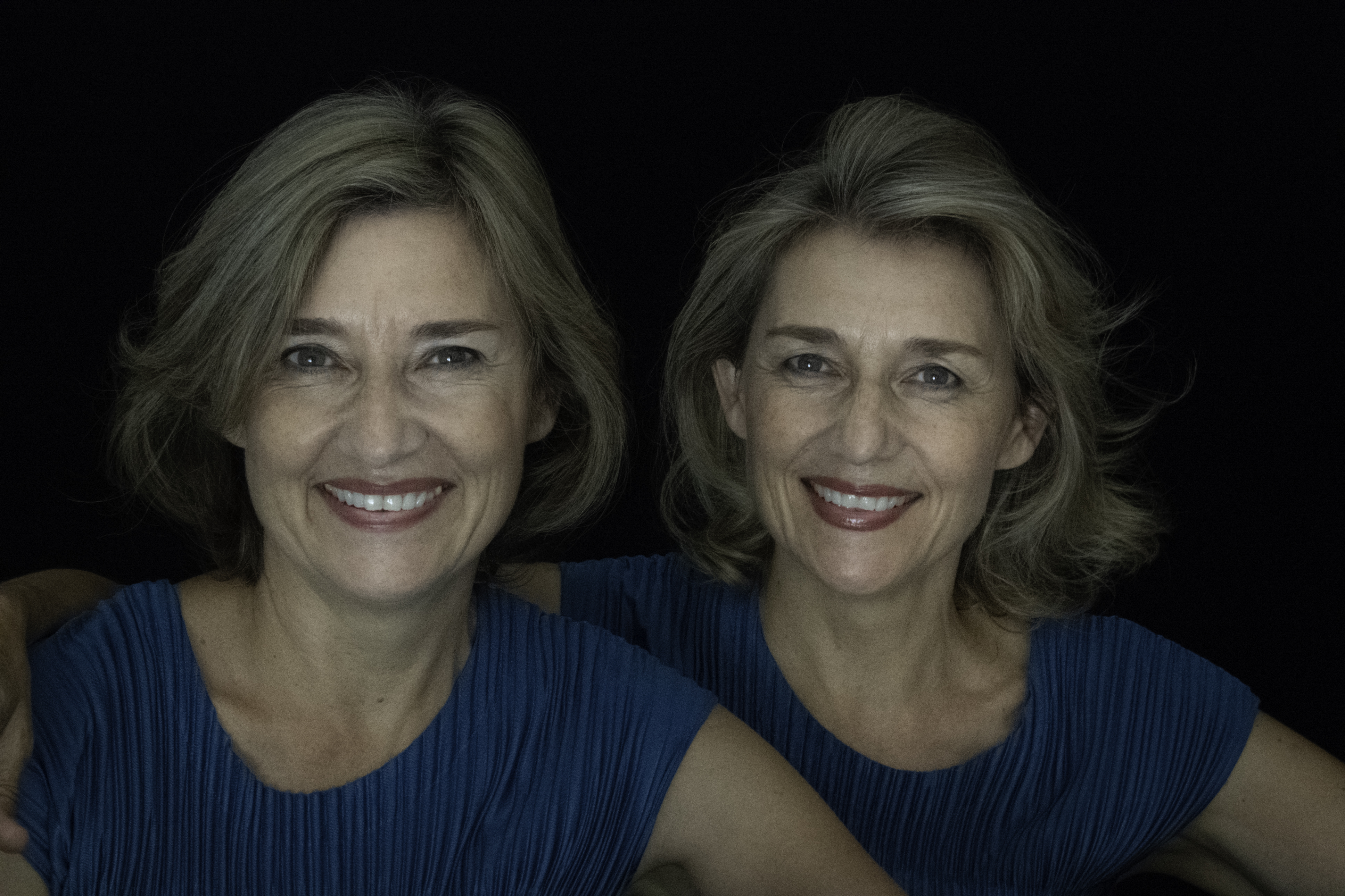 Photo d'Hugues Charrier